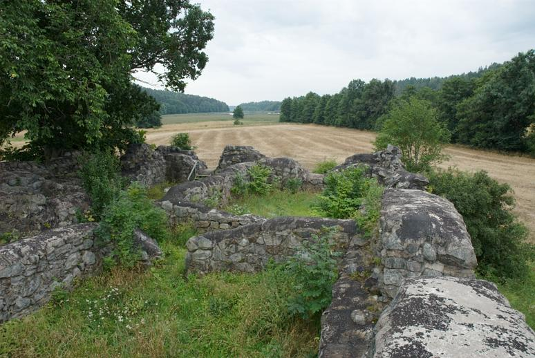 Som sätesgård kan Hemmesta beläggas första gången 1434. Motiv: Hammersta borgruin Kategori: Borg Som sätesgård kan Hemmesta beläggas första gången 1434.